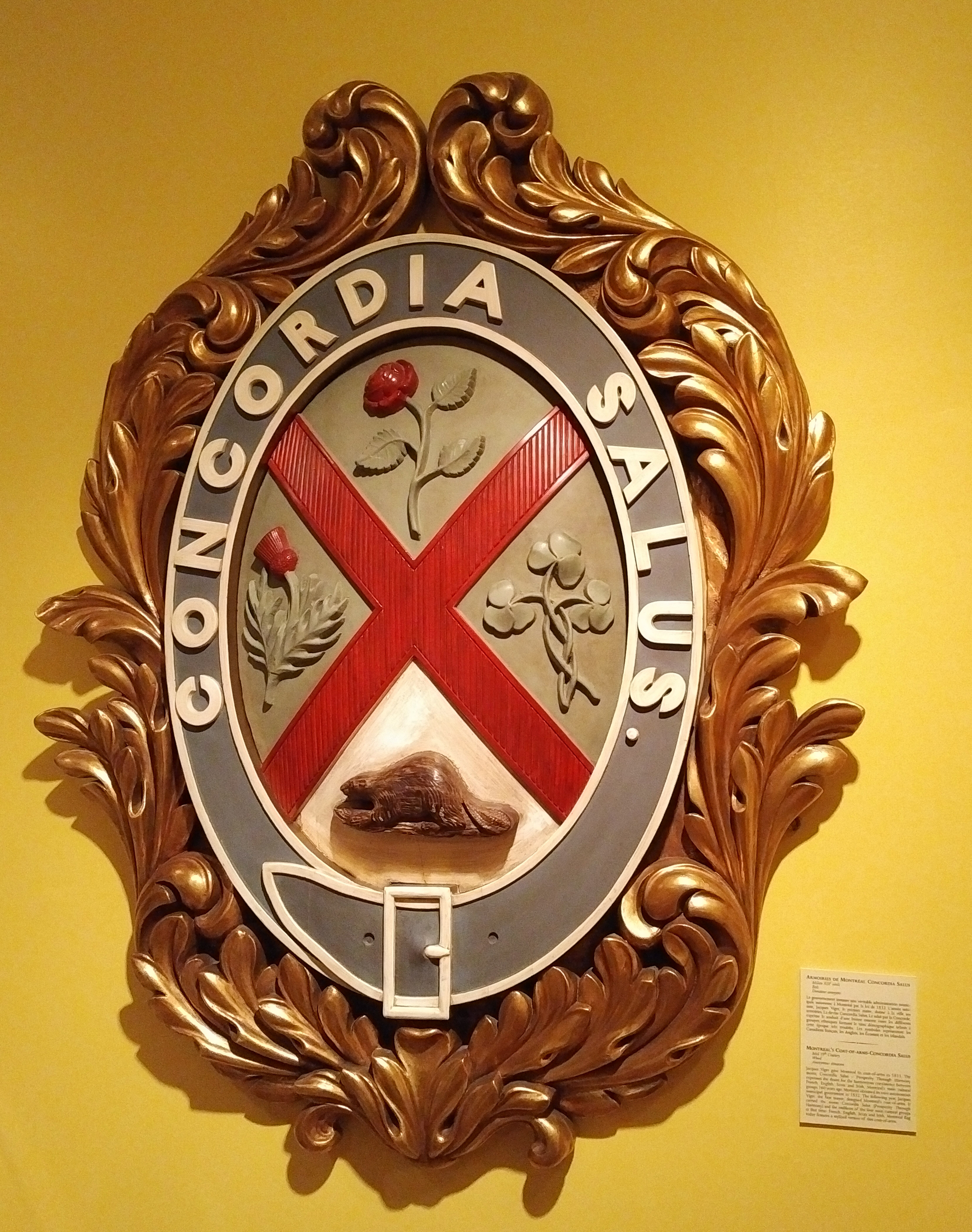 Armoiries de Montreal Concordia Salus. Bas-relief en bois datant du milieu XIXe siècle Le musée du Château Ramezay présente ainsi le sujet : « Le gouvernement instaure une véritable administration municipale autonome à Montréal par la loi de 1832. L'année suivante, Jacques Viger, le premier maire, donne à la ville ses armoiries. La devise Concordia Salus, Le salut par la Concorde, exprime le souhait d'une bonne entente entre les différents groupes ethniques formant le tissu démographique urbain à cette époque très troublée. Les symboles représentent les Canadiens français, les Anglais, les Ecossais et les Irlandais. »